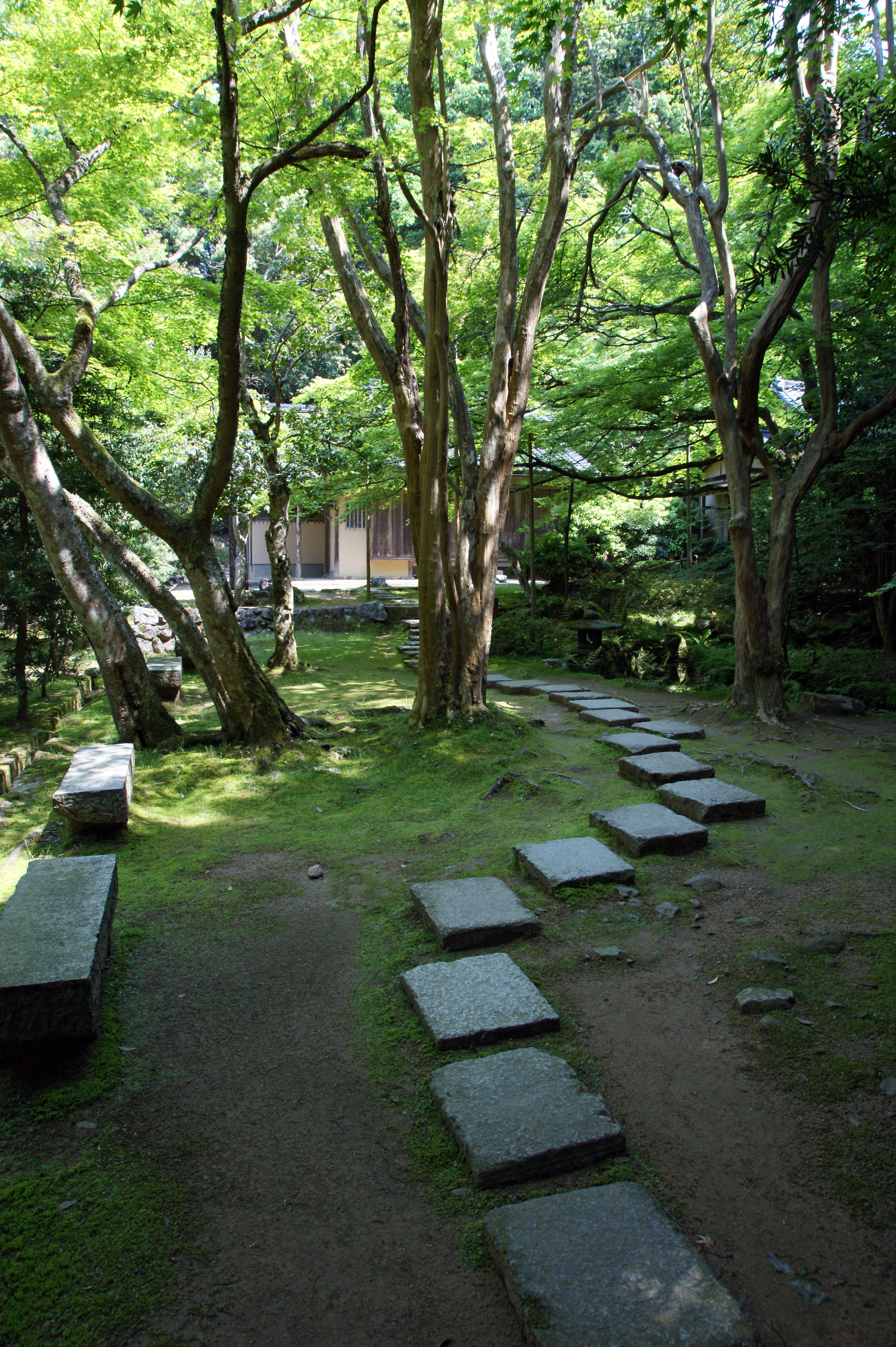 Sukyoji in Izushi, Toyooka, Hyogo prefecture, Japan